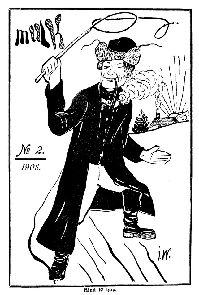 Mulk, esikaas